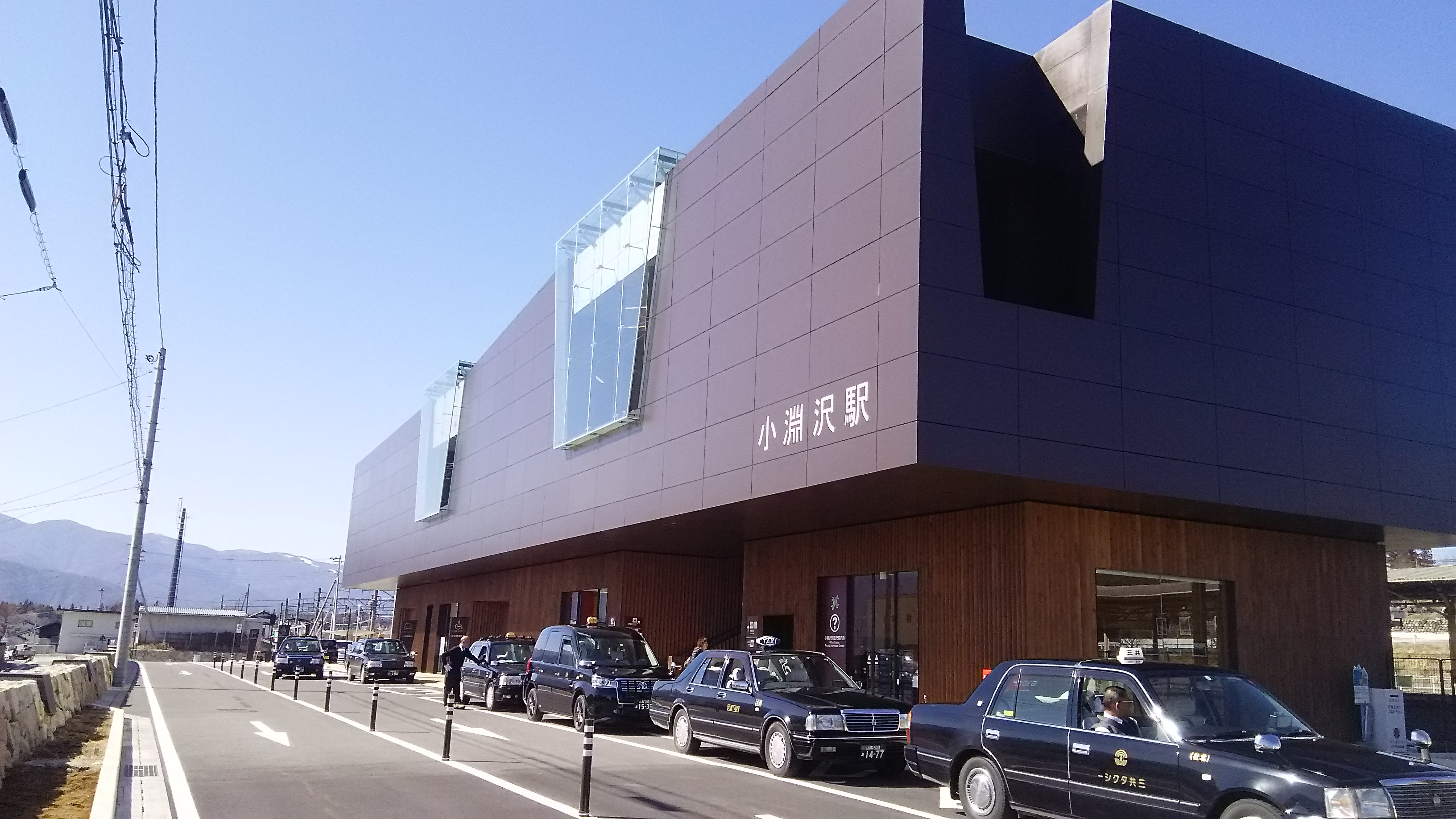 小淵沢駅新駅舎とタクシープールの画像です。